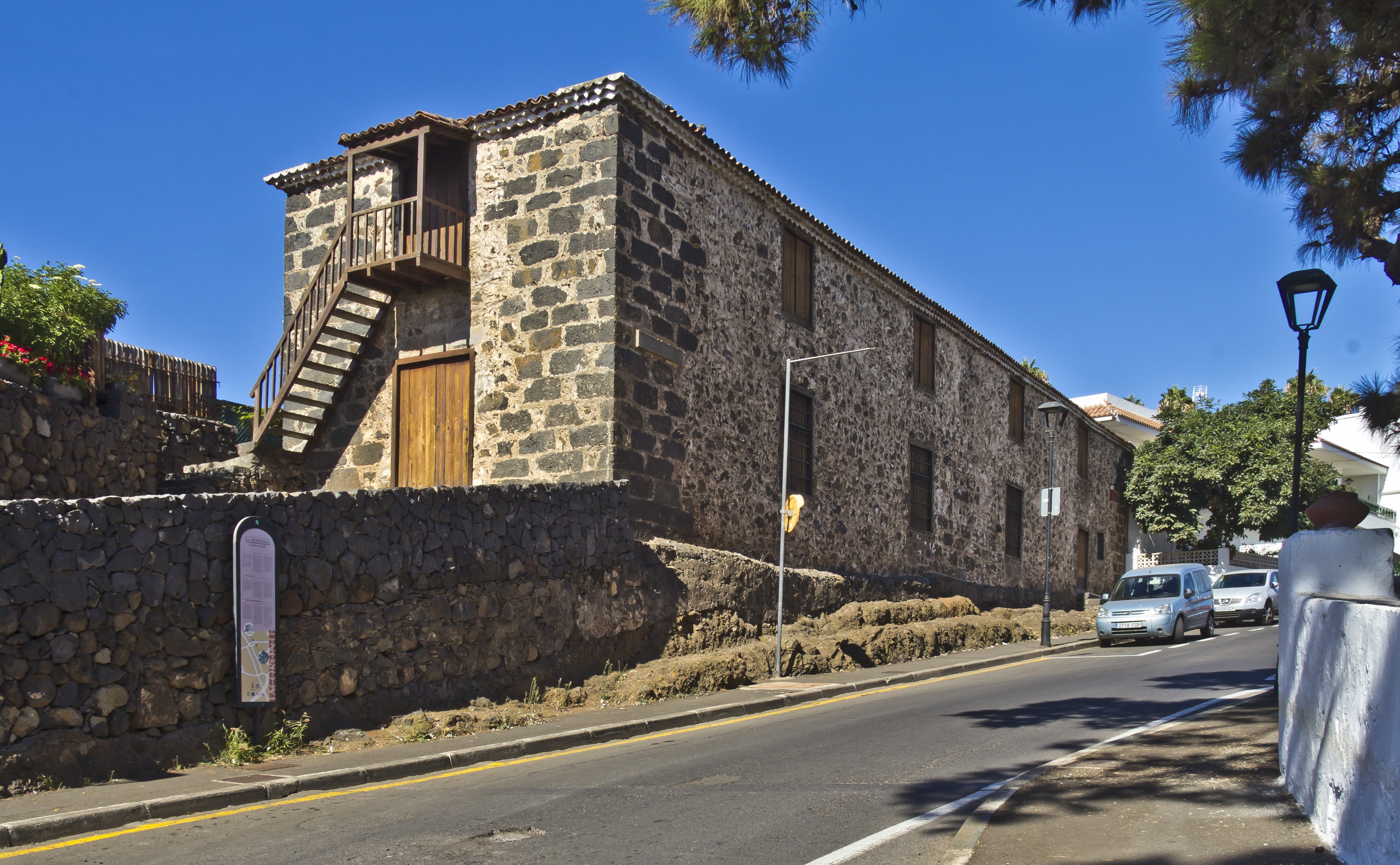 Die Casa de la Alhóndiga ist Teil des Conjunto Histórico Artístico der Stadt Tacoronte (Tenriffa)